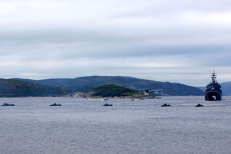 Морские пехотинцы Северного флота отработали высадку морского десанта с БДК на бронетранспортерах.